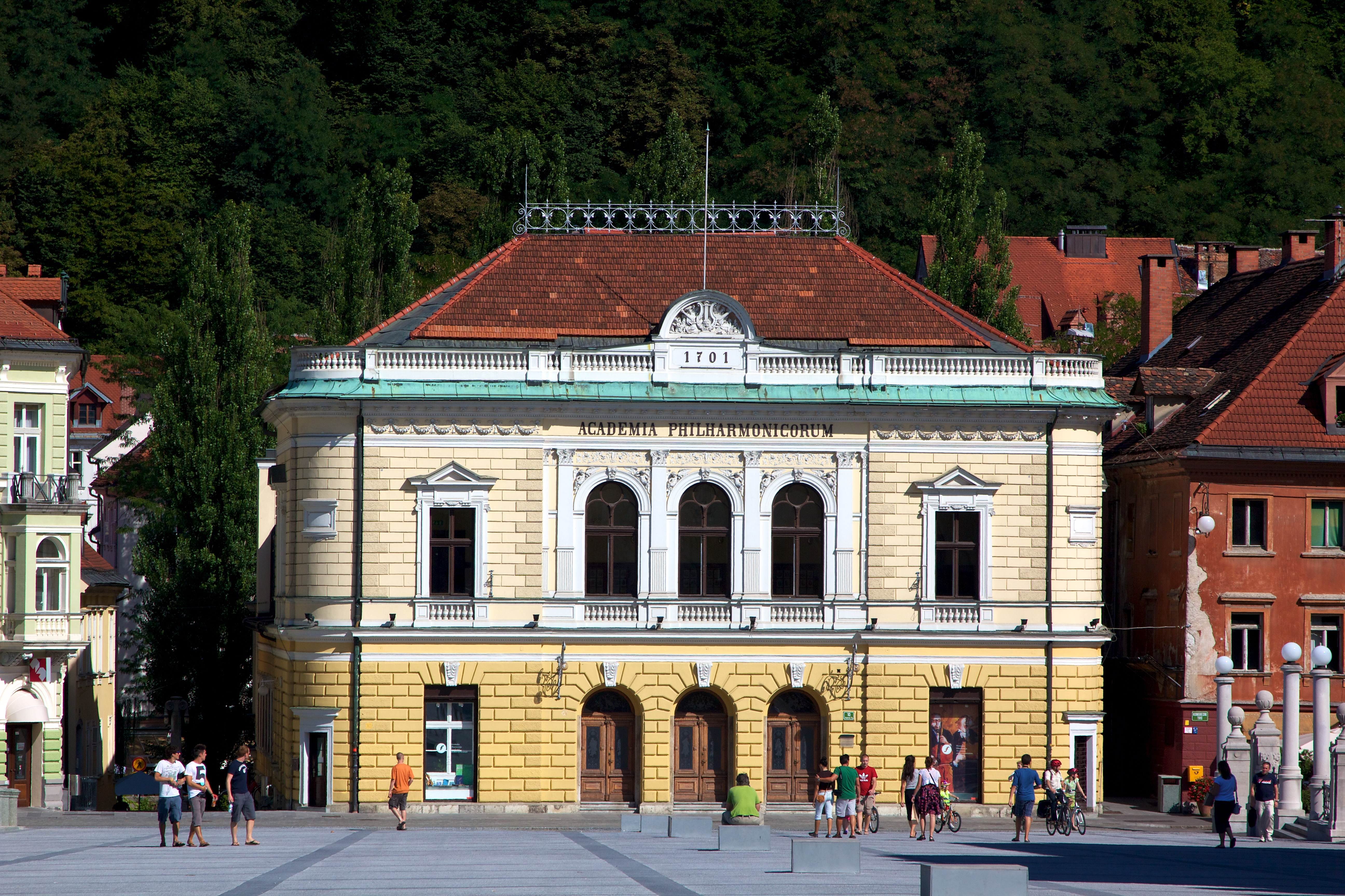 Slovenian Philharmonic 001